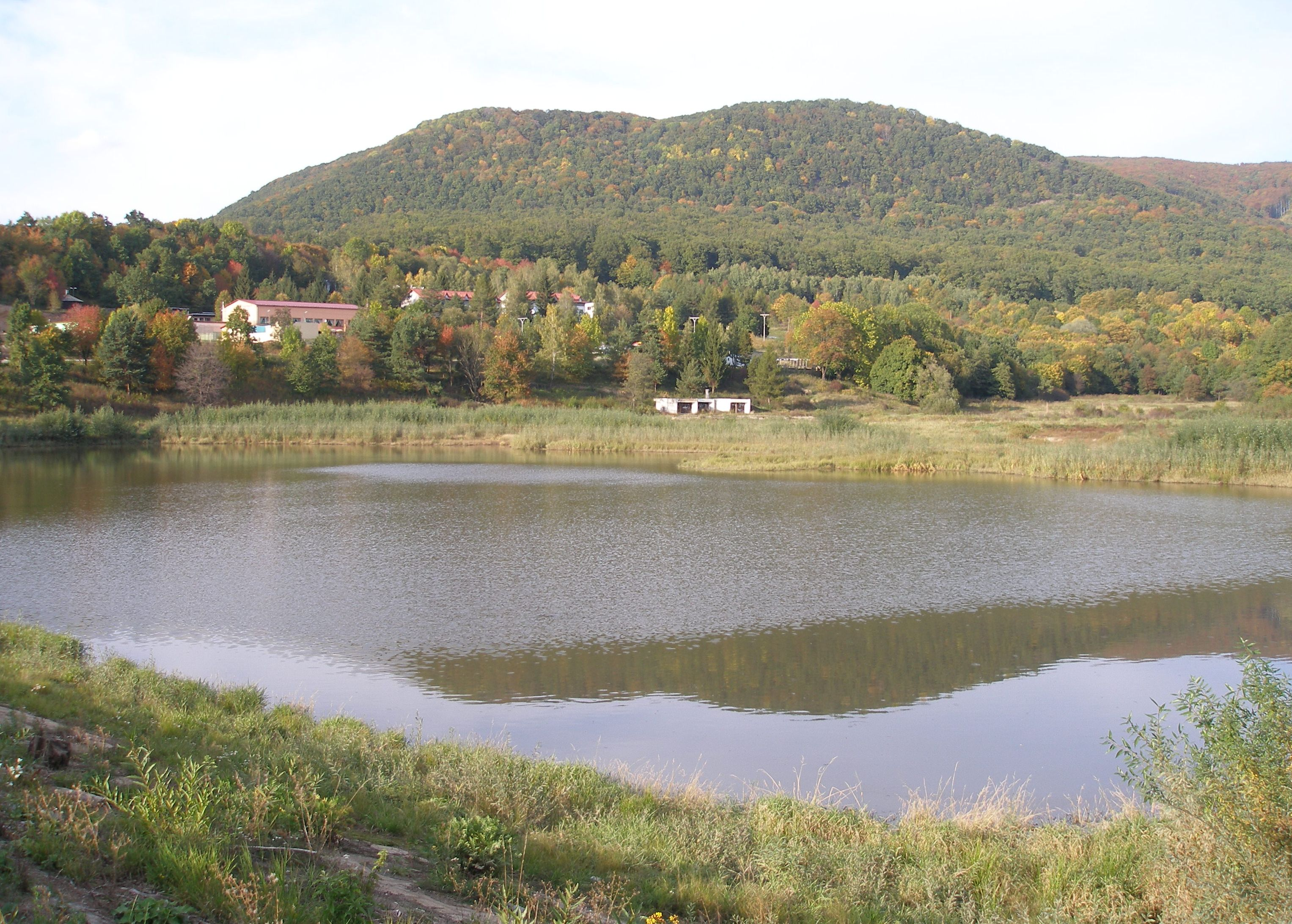 Rekreačná oblasť Sigord nad obcou Kokošovce, okres Prešov, región Šariš